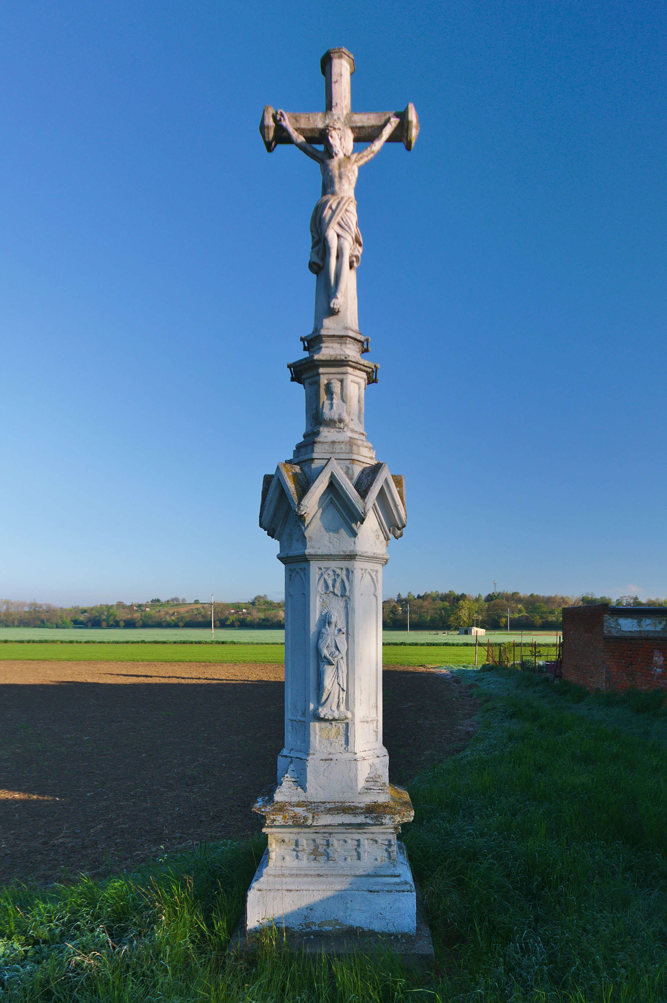 Kříž na konci ulice Šafaříkova, Němčice nad Hanou, okres Prostějov